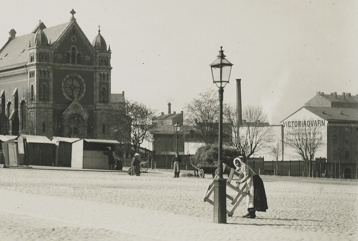 Ångkvarns AB Victoria, Folkungagatan 2 A (Stockholms katolska domkyrka syns till vänster)